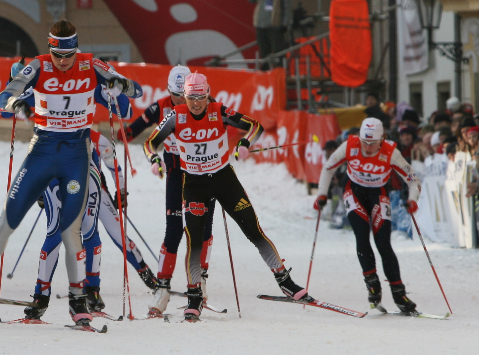 Evi Sachenbacher-Stehle (number 27) in the quaterfinals of Tour de Ski in Prague